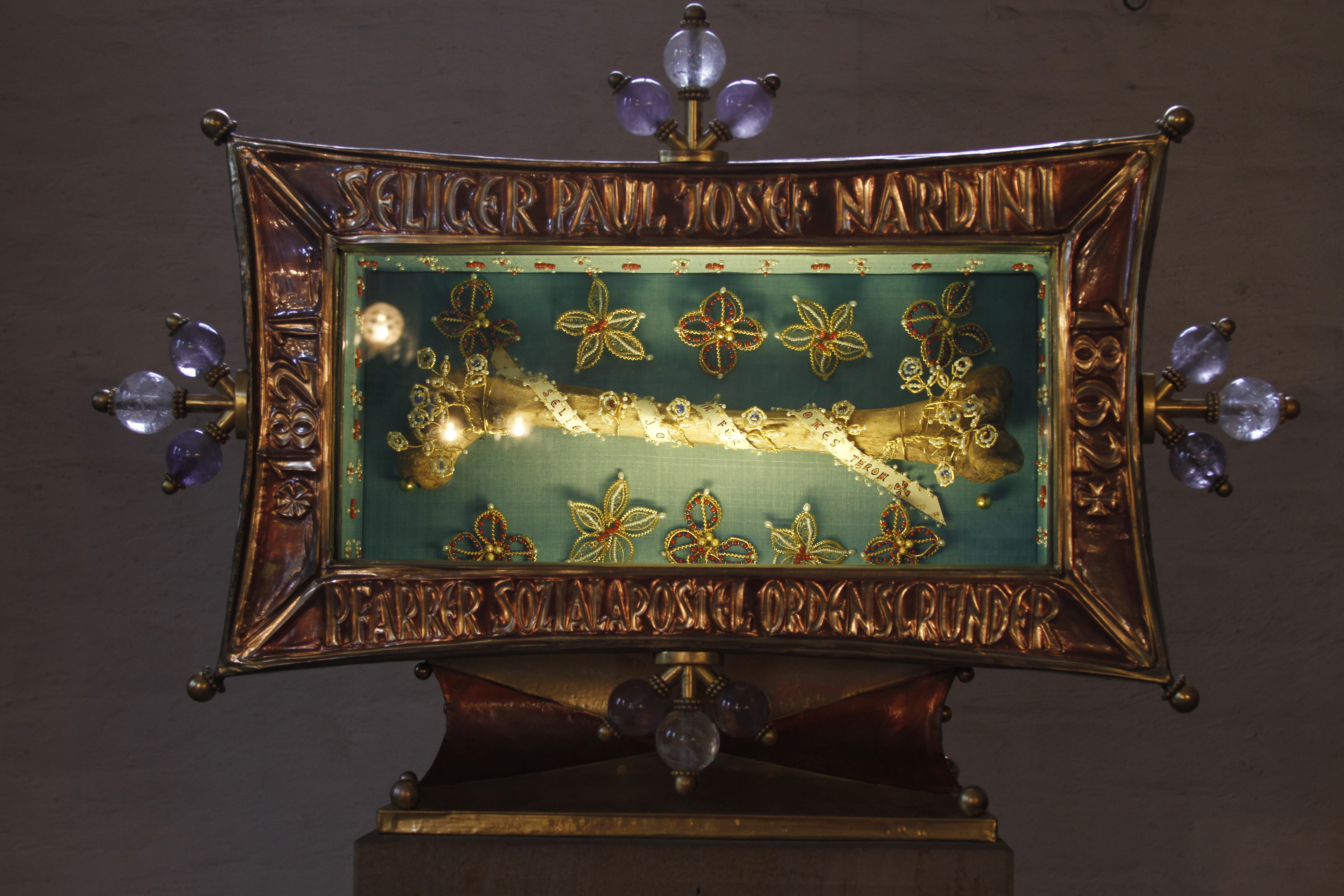 Speyer Cathedral - Speyer - Germany